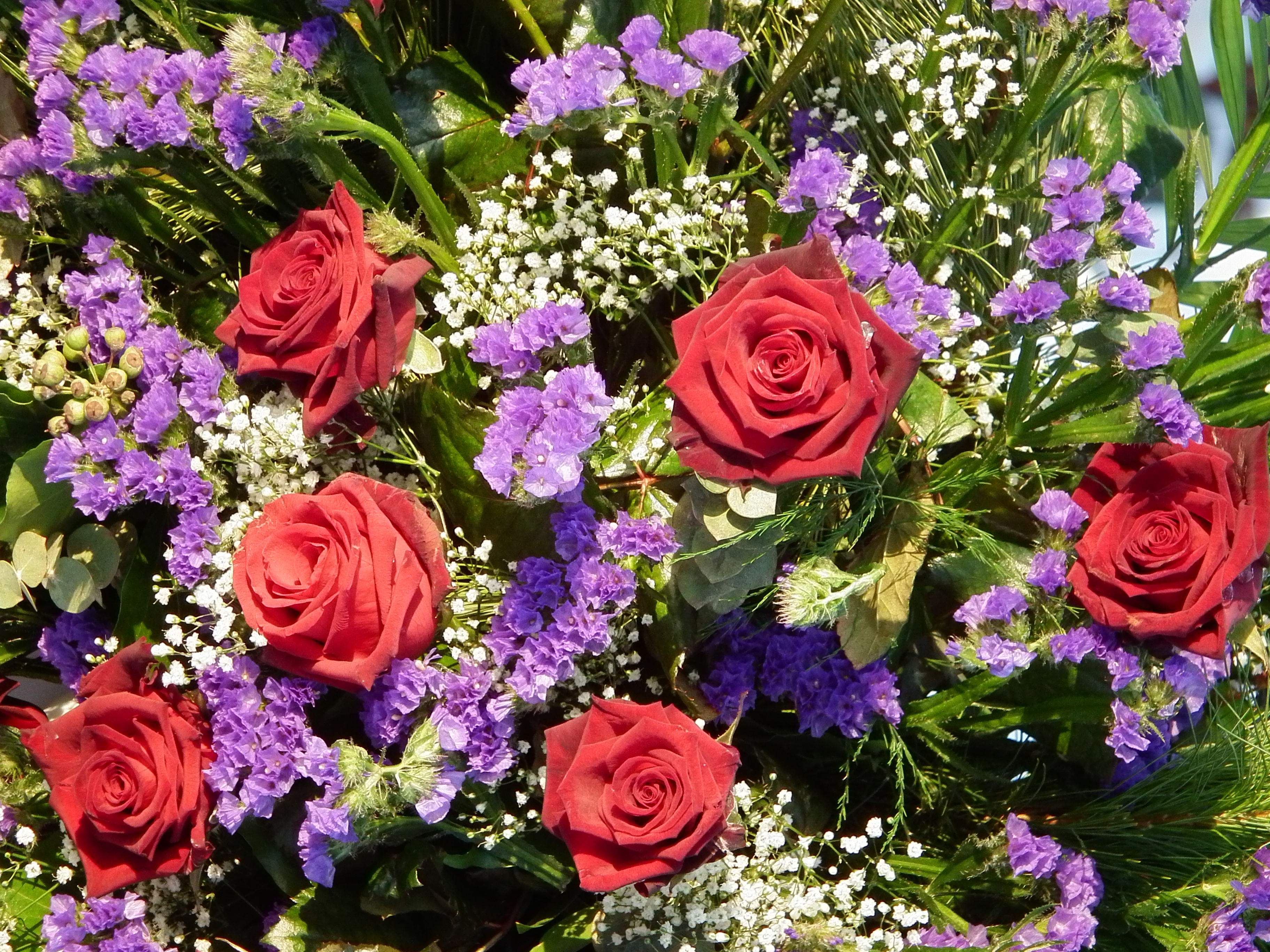 Rote Rose, kombiniert mit Schleierkraut (Gypsophila paniculata) und Geflügeltem Strandflieder (Limonium sinuatum)